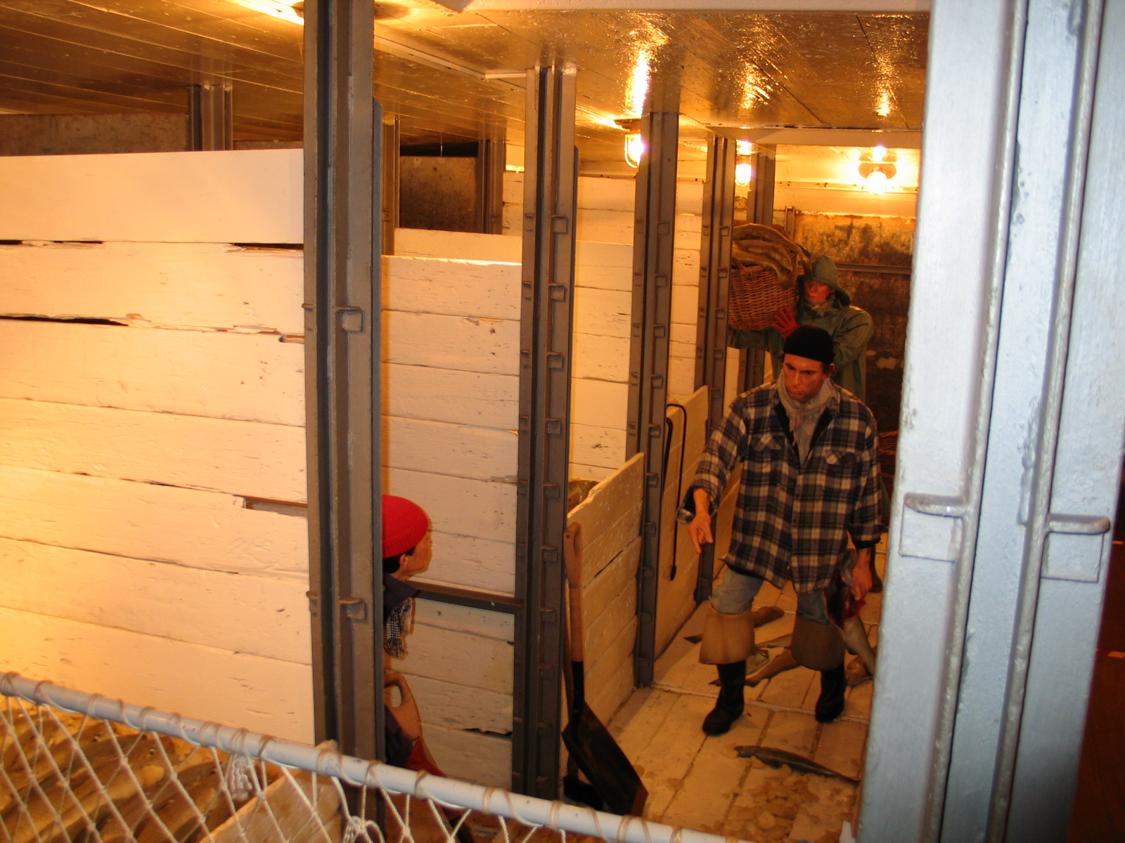 Aan boord van de O.129 Amandine - eigen foto